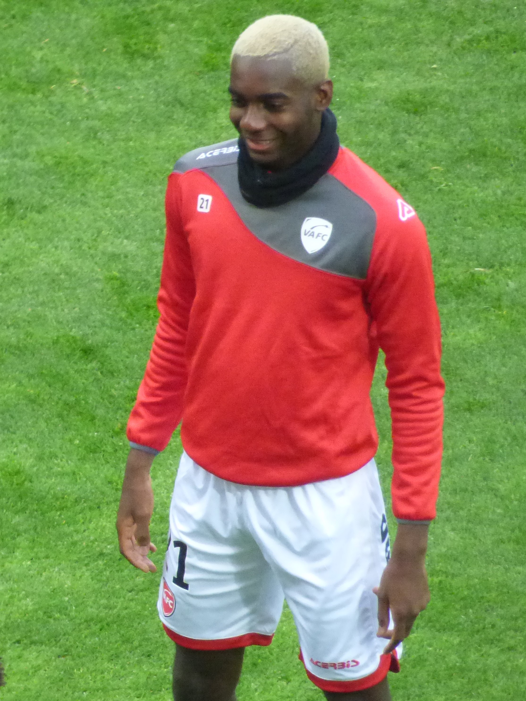 Eden Massouema avant le match Lens-Valenciennes, comptant pour la 32ème journée du championnat de France de football de Ligue 2 2018-2019, le 12 avril 2019, au Stade Bollaert-Delelis.